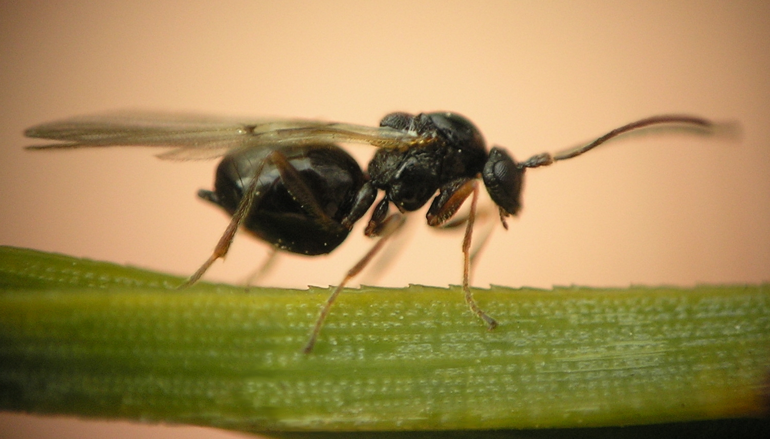 galasówka sp. (prawdopodobnie g. dębianka Cynips quercusfolii) Brok, Polska